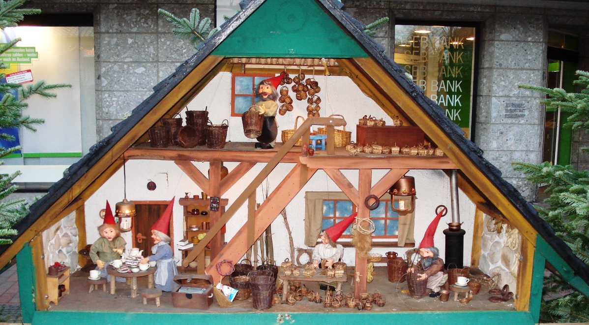 Häuschen des Zwergenwaldes in Bad Schwartau